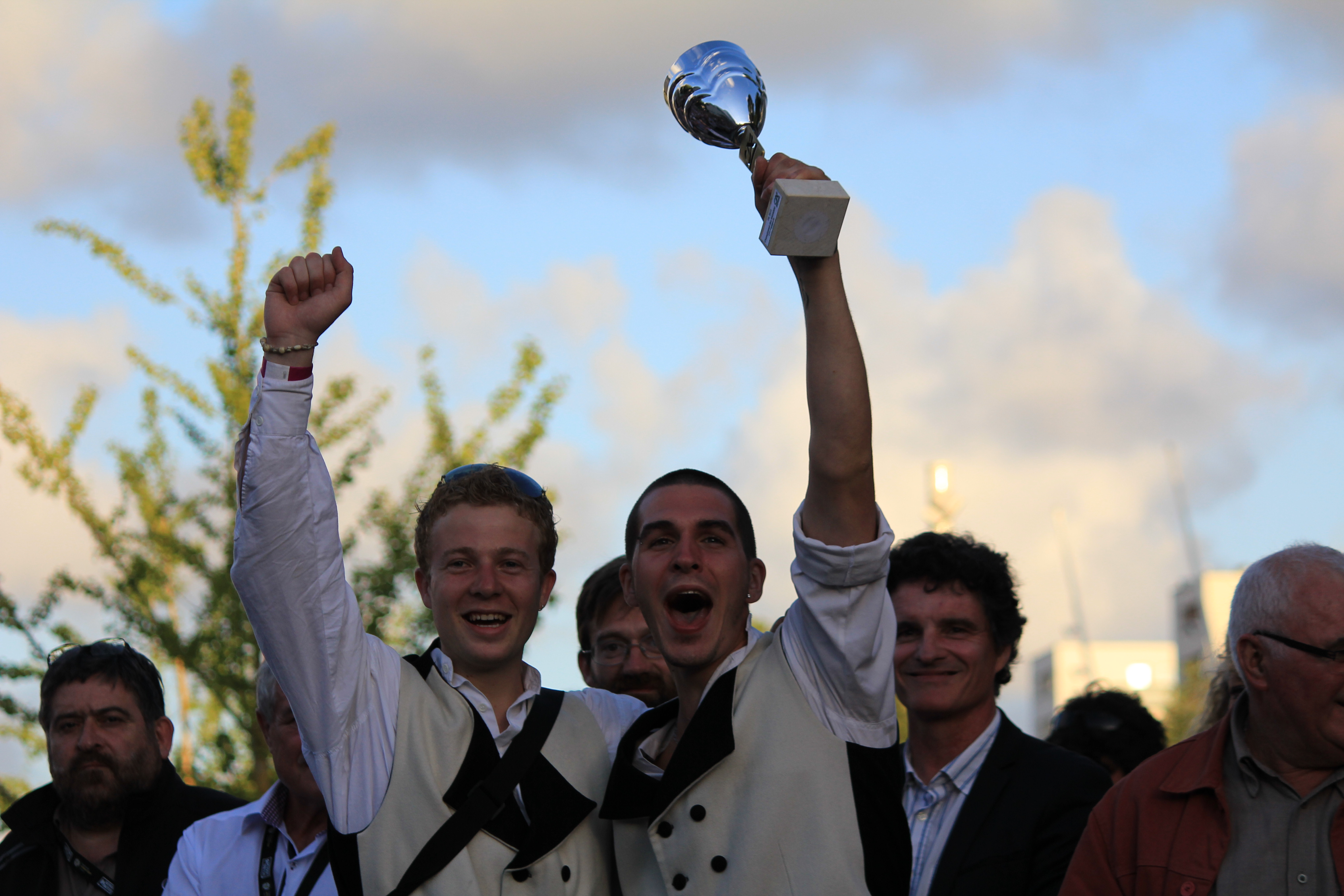 Annonce des résultats du championnat national des bagadoù 2013 dans le cadre du festival interceltique de Lorient : Bagad Bro Felger